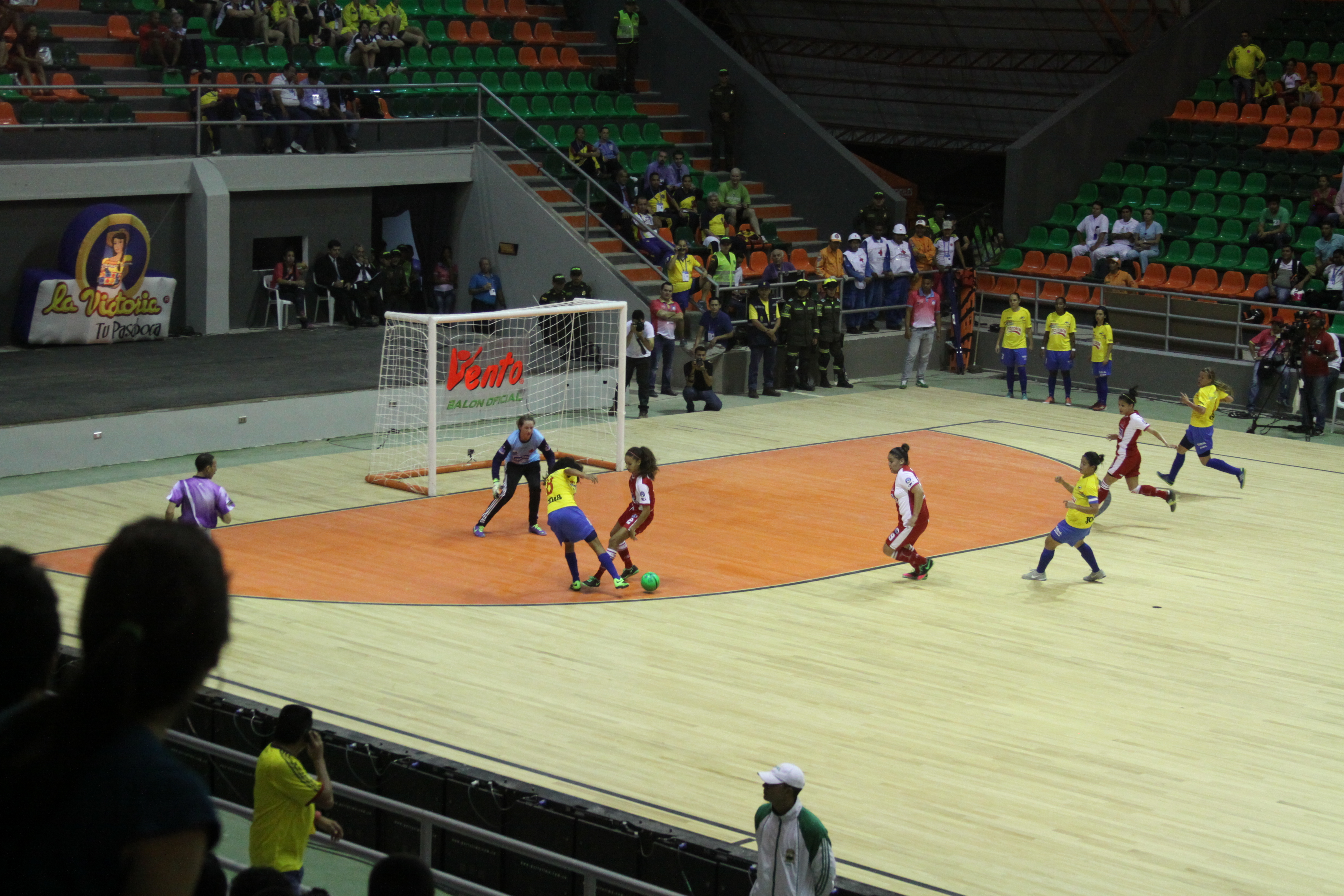 CERCA DE 500 POLICIAS GARANTIZAN LA SEGURIDAD EN EL II CAMPEONATO MUNDIAL FEMENINO DE FUTBOL DE SALON EN BARRANCABERMEJA Desde el 6 hasta el 16 de noviembre, la capital petrolera de Colombia es sede del II campeonato mundial femenino de fútbol de salón donde participan 16 selecciones de igual número de países. En la imagen, escena del juego de la primera ronda, grupo A, llevado a cabo el 7 de noviembre, en que el equipo local venció a la selección de Canadá 16:0. Para garantizar la seguridad en este evento deportivo la Policía Nacional dispuso de cerca de 500 hombres y mujeres de las diferentes especialidades, quienes durante estos 10 días de competencia tendrán el compromiso y responsabilidad institucional de brindar a propios y visitantes las condiciones necesarias para que disfruten de la fiesta de este deporte universal en la segunda ciudad del departamento de Santander. En el acto inaugural del Certamen deportivo en el Coliseo Cubierto de esta ciudad, el señor Brigadier General Saúl Torres Mojica Comandante de la región 5 de Policía, reconoció el esfuerzo policial que para este evento hace la Institución y argumentó que una vez mas La policía Nacional demuestra su profesionalismo y capacidad humana y técnica para afrontar un evento de gran magnitud como este.